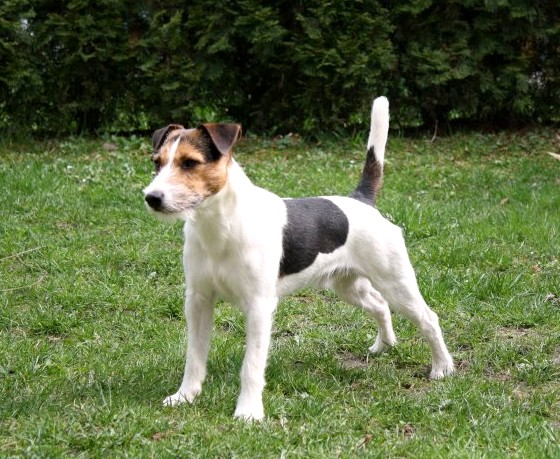 "Dark of Parson Place" Parson Russell Terrier Broken coated (Stockhaar) und Tricolor